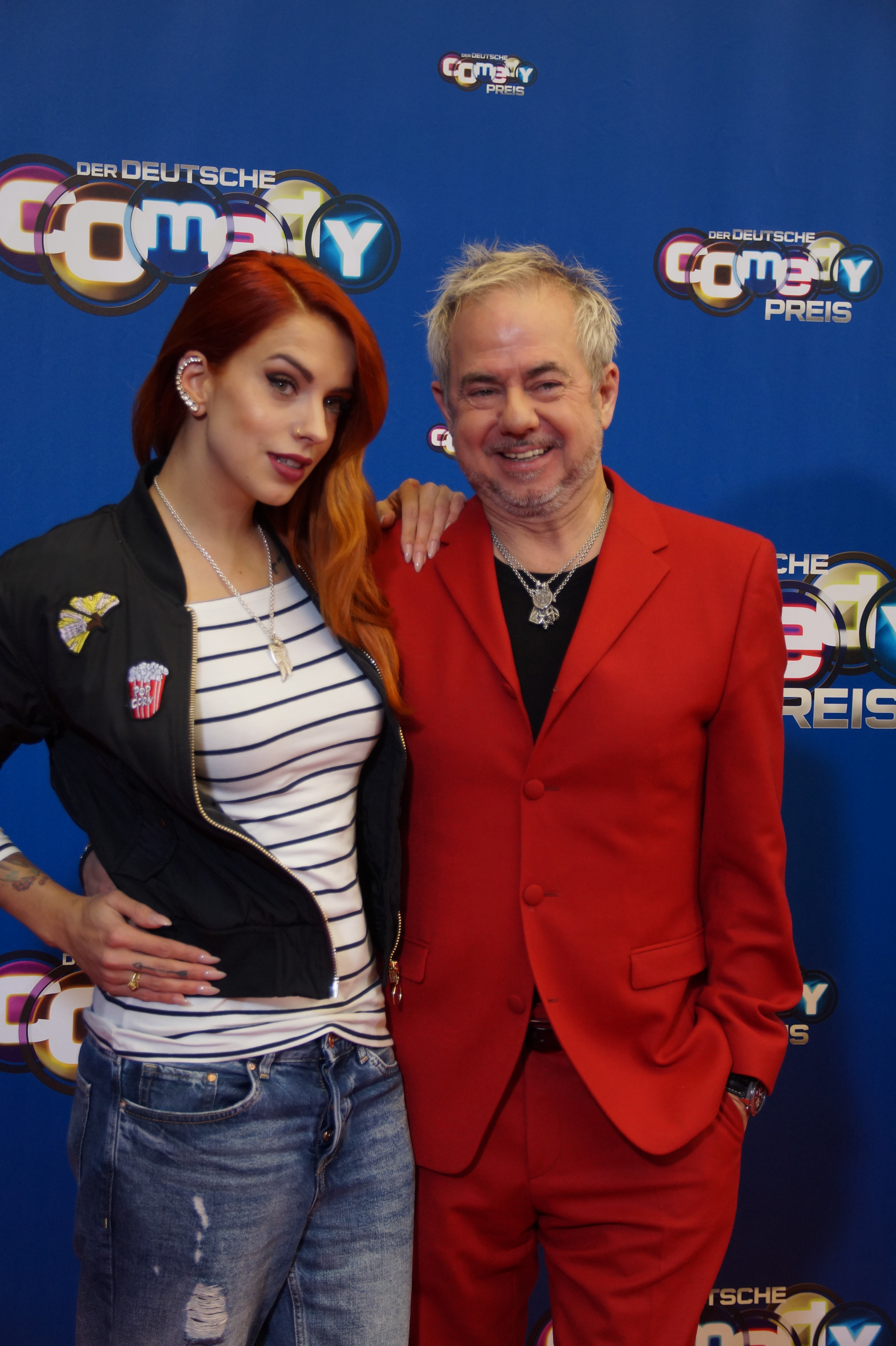 Helmut Zerlett mit Tochter Jana Naïma Zerlett beim Comedypreis 2016, im Oktober, Köln.